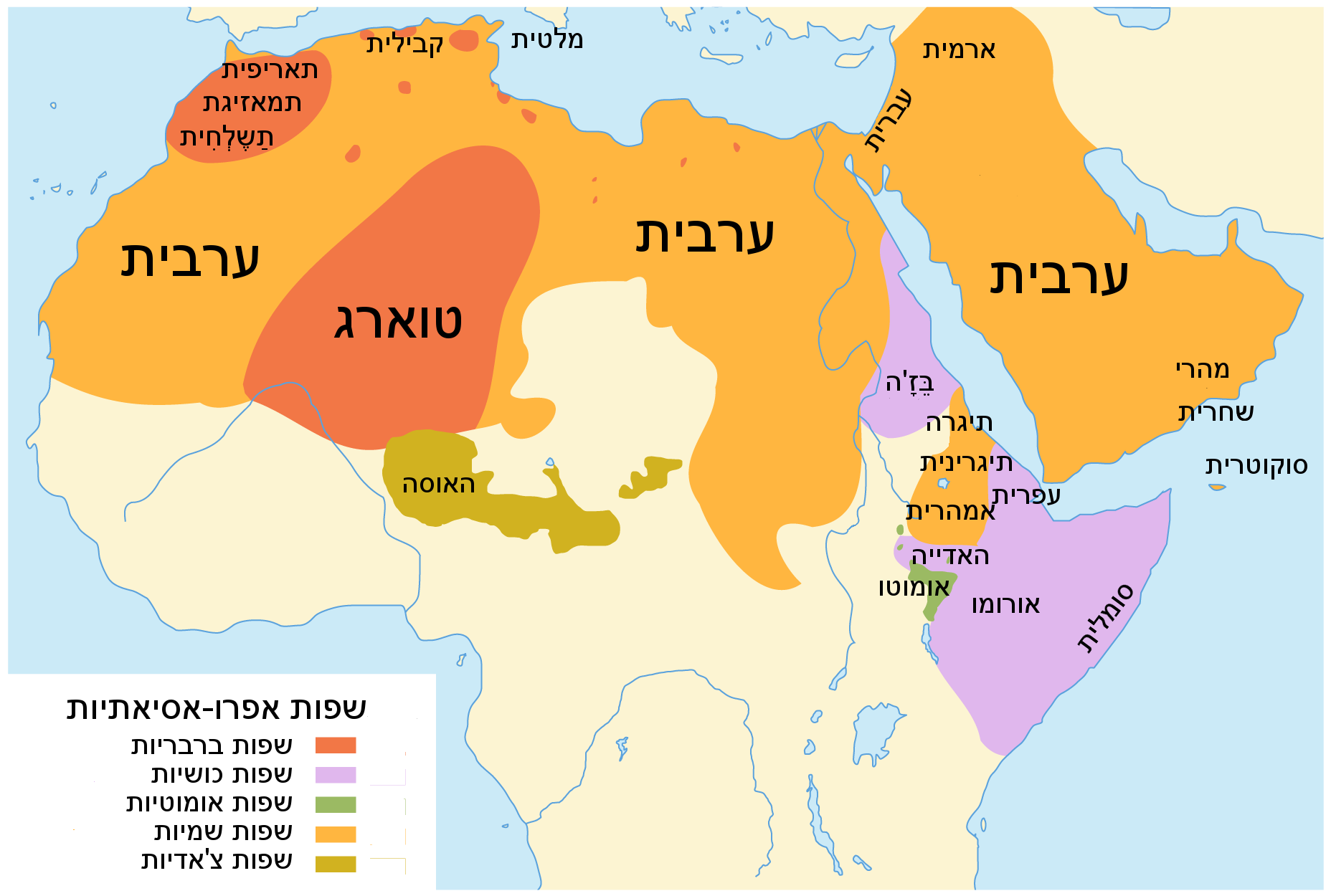 Afroasiatischen Sprachen